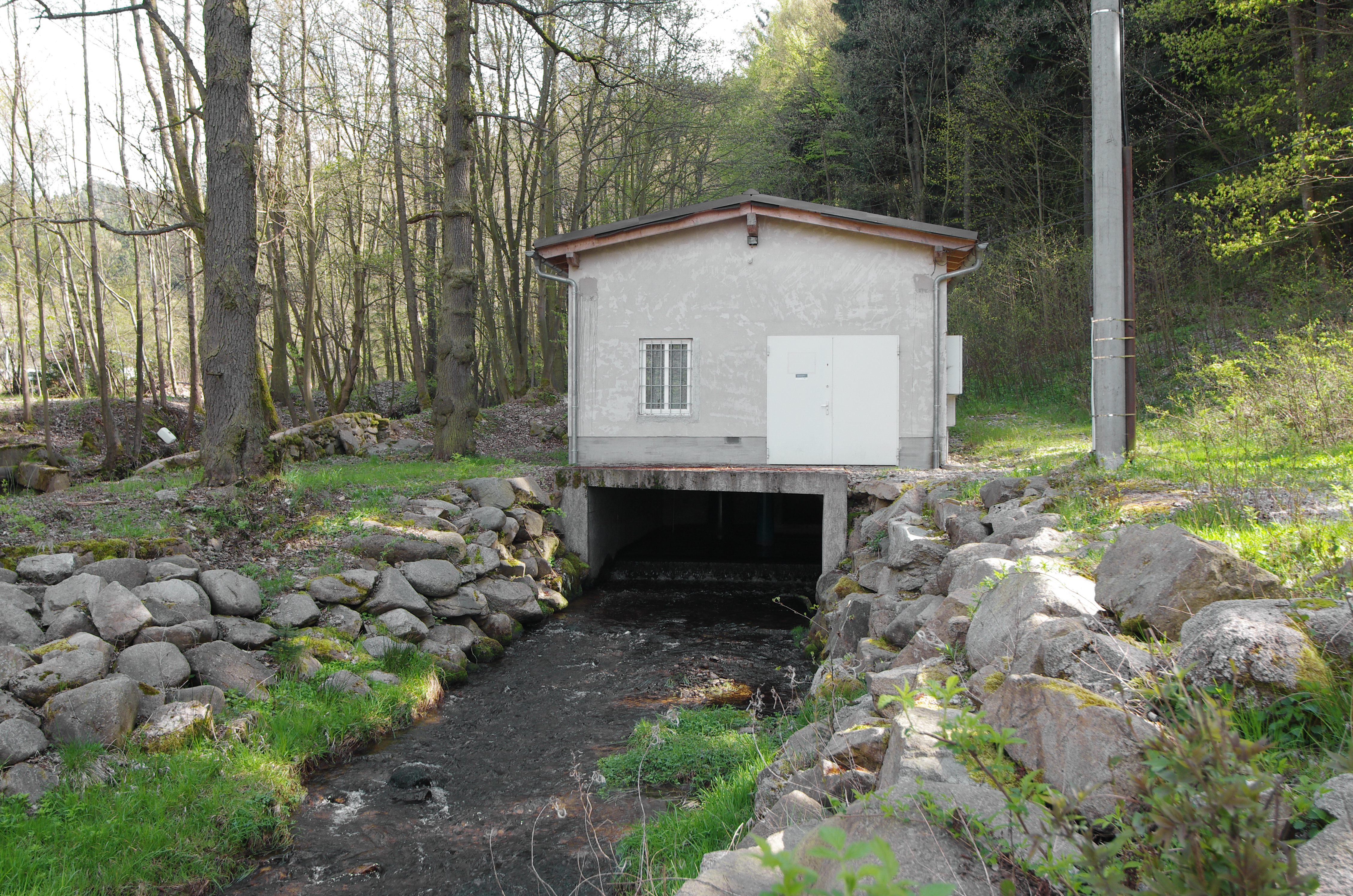 Lobezský potok nas Sokolovem, malá vodní elekrárna u bývalé obce Vítkov, okres Sokolov